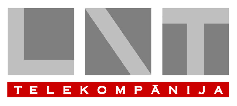 Логотип LNT во время 1996 до 2000 года